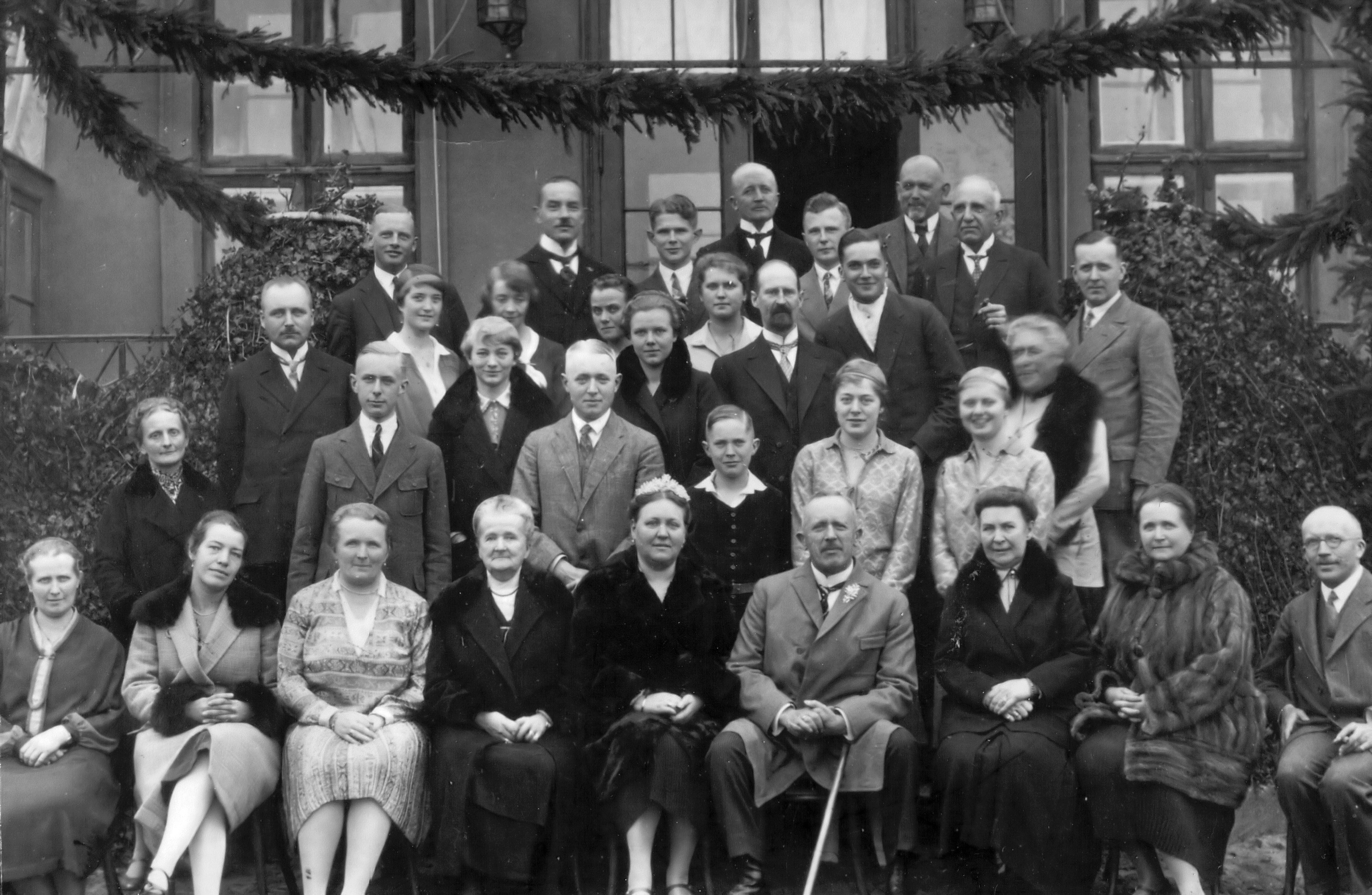 Beschreibung: Familienzusammenkunft der Familie von Bülow anlässlich der Silberhochzeit des Otto von Bülow und seiner Frau Auguste, geb. Freiin von Plessen (a.d.H. Dolgen) vor deren Gutshaus Rogeez (Mecklenburg) am 28.10.1928 *Quelle: Foto selbst eingescannt und selbst bearbeitet; das Originalfoto stammt aus dem Jahre 1928 und liegt mir vor * Urheber: mir unbekannter Fotograf